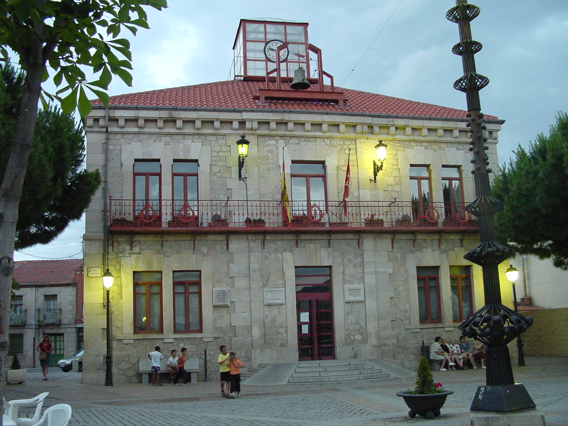 Ayuntamiento de Guadalix de la Sierra